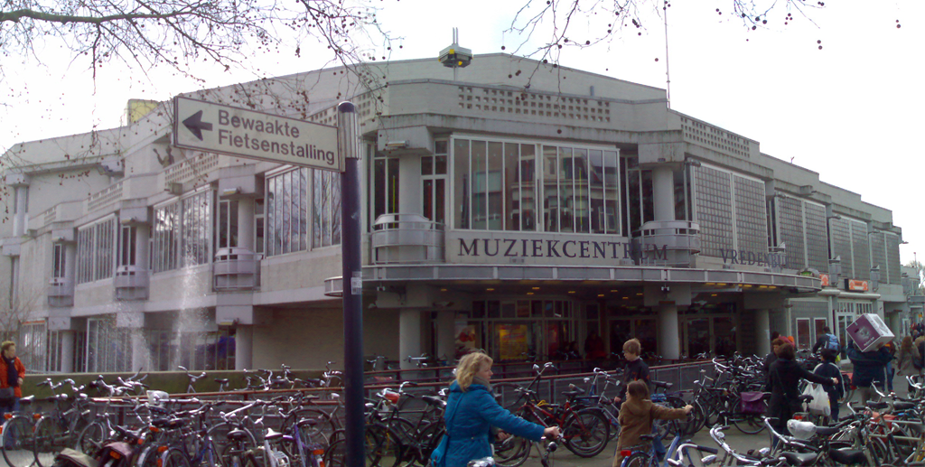 Eigen foto. 17 maart 2007 (march 17, 2007). Muziekcentrum Vredenburg, Utrecht, Netherlands.